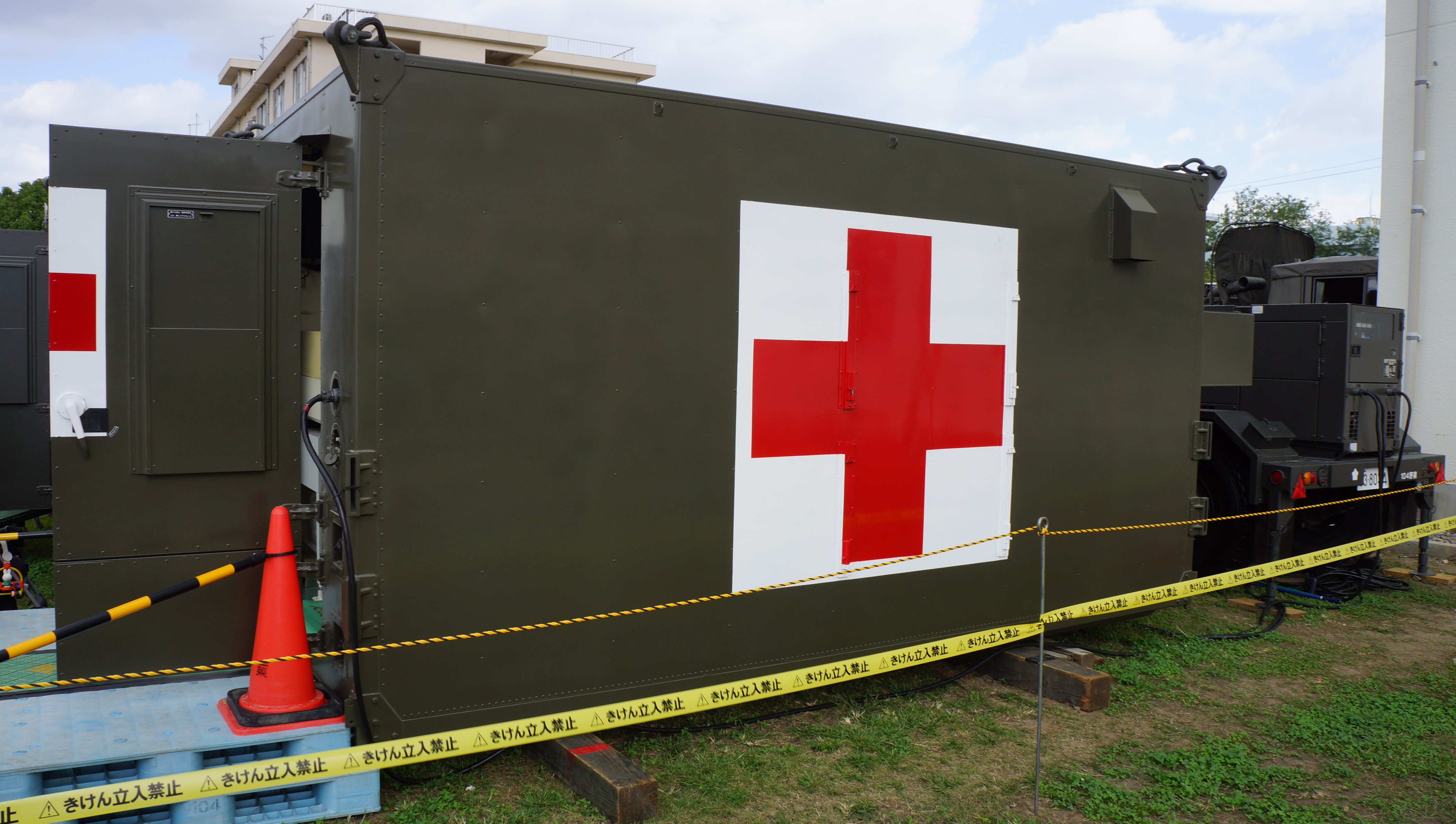 野外手術システム 手術準備ユニット側から 12年10月7日 伊丹駐屯地にて